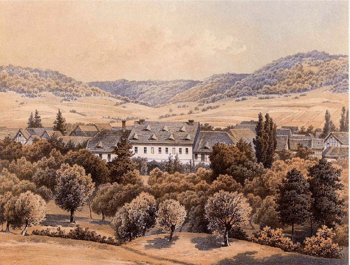 Rittergut Sollstedt, Landkreis Nordhausen, Provinz Sachsen